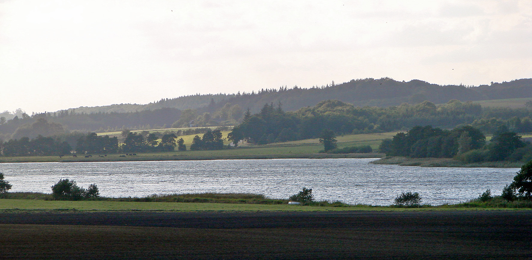 Hinge Sø nord for Silkeborg, Jylland, Denmark